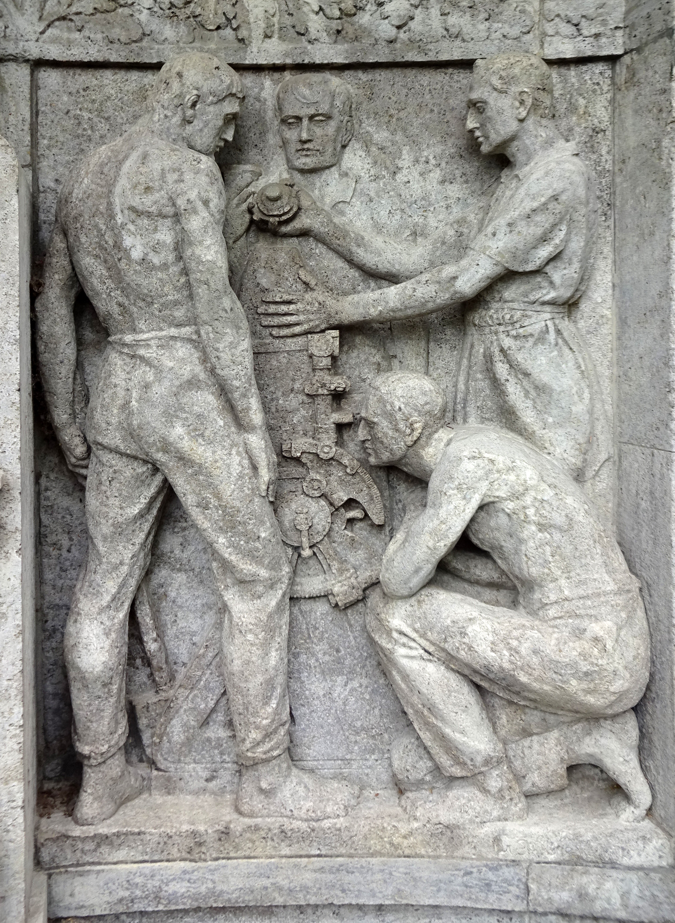 Grabstätte Karl Völler, Relief rechts: Arbeiter bei der Herstellung eines von unter Karl Völler entwickelten Minenwerfers mit Präzisionswerkzeugen, in dem Moment, wo der Zünder ins Geschoss eingedreht werden soll. Bildhauer Georg Busch